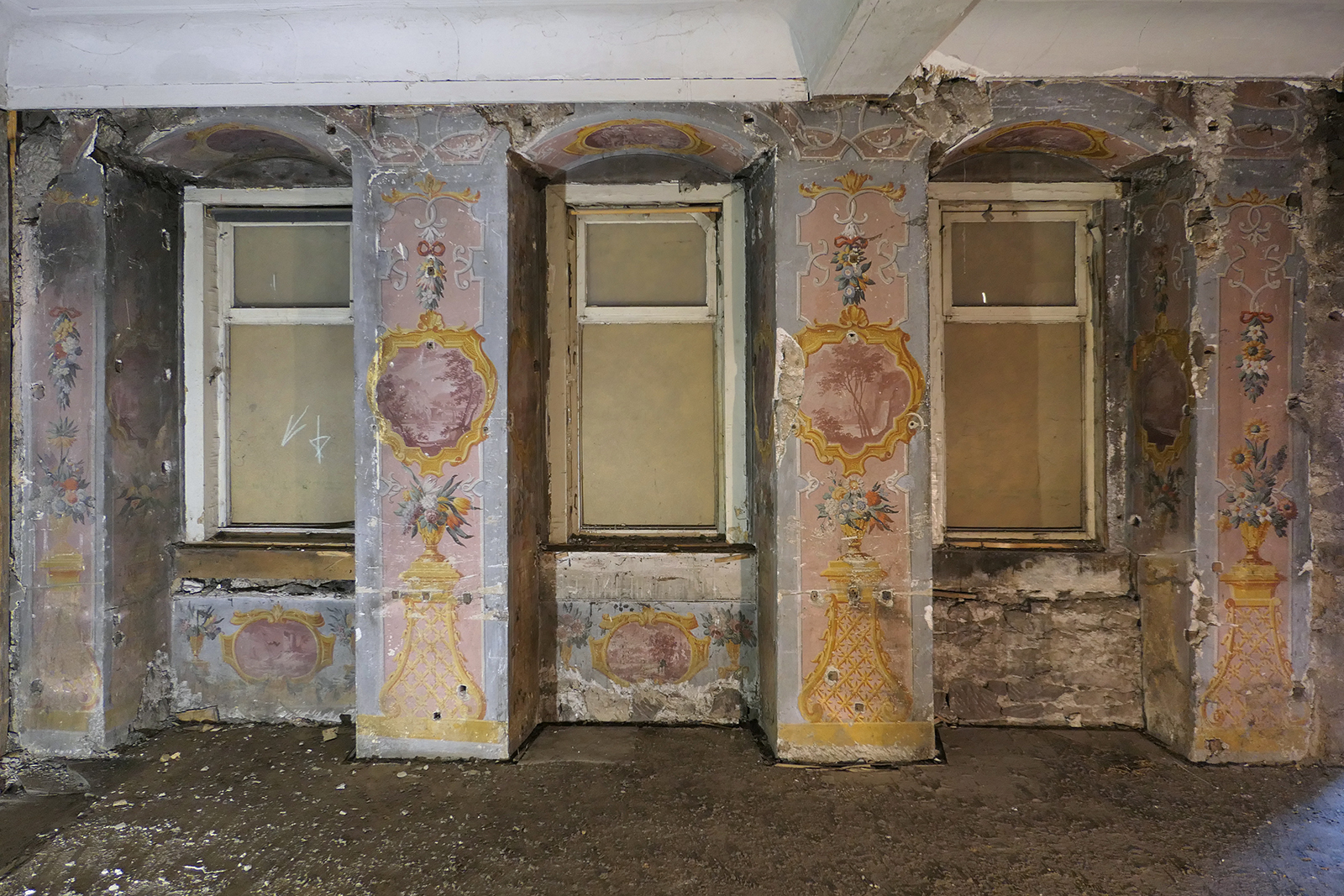 Gotha, Augustinerstraße 15, Amtshaus, Gesamtansicht der barocken Fresken im ersten Obergeschoss (2019)